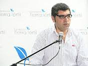 Dario Duretti presidiendo la fundacion Tierra Fertil